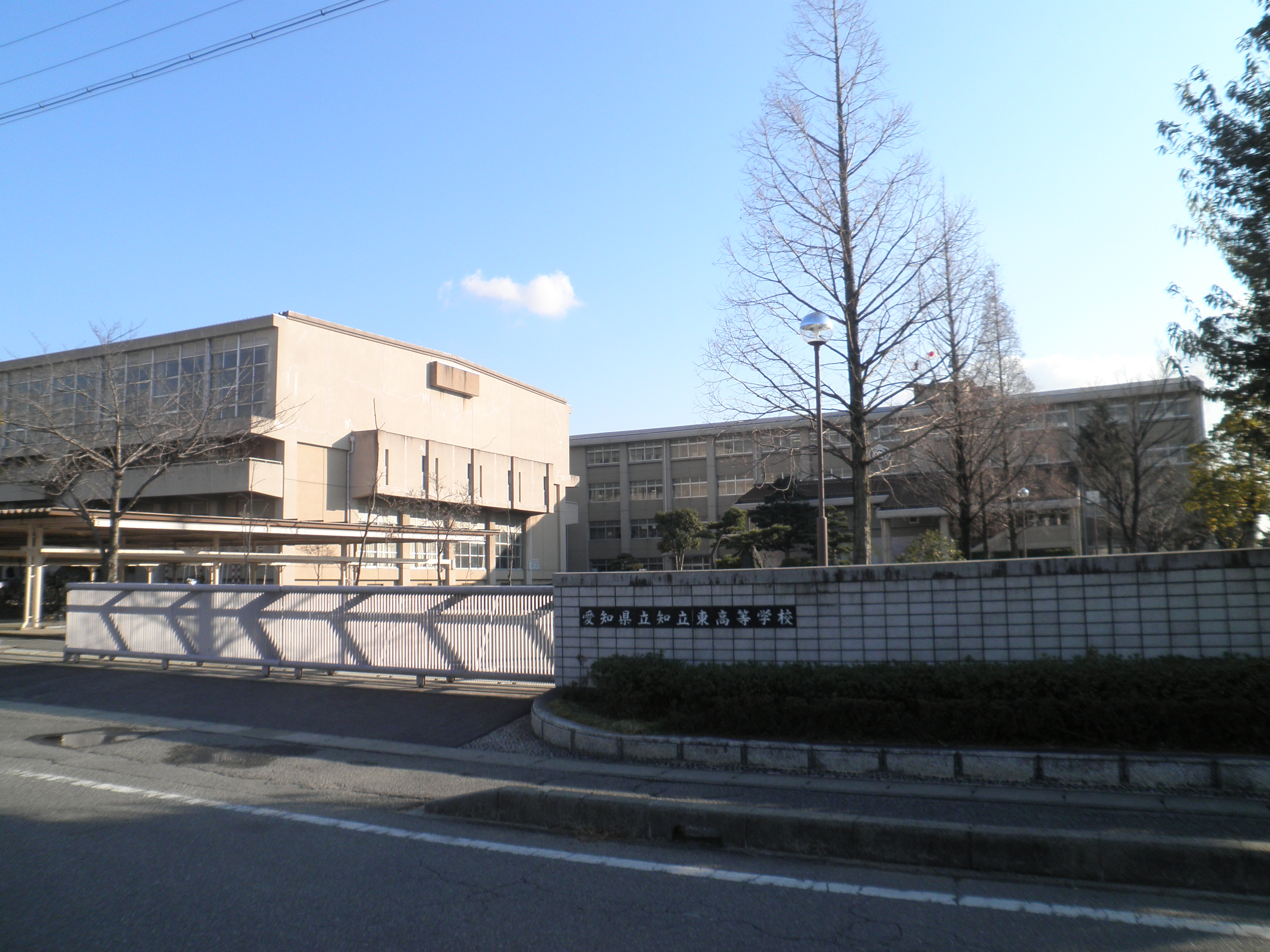 愛知県知立市長篠町にある愛知県立知立東高校